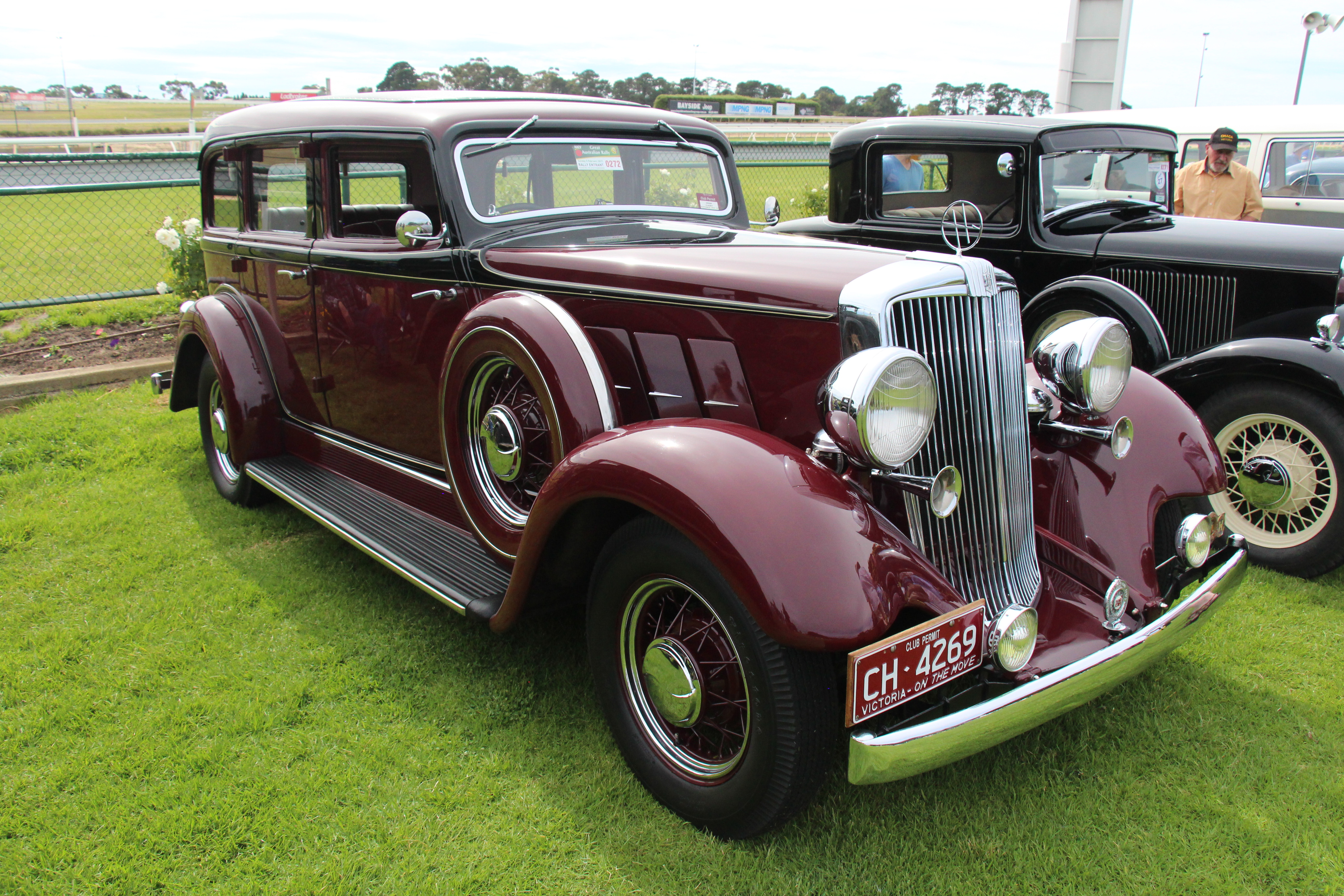 1933 Hupmobile K-321 Sedan